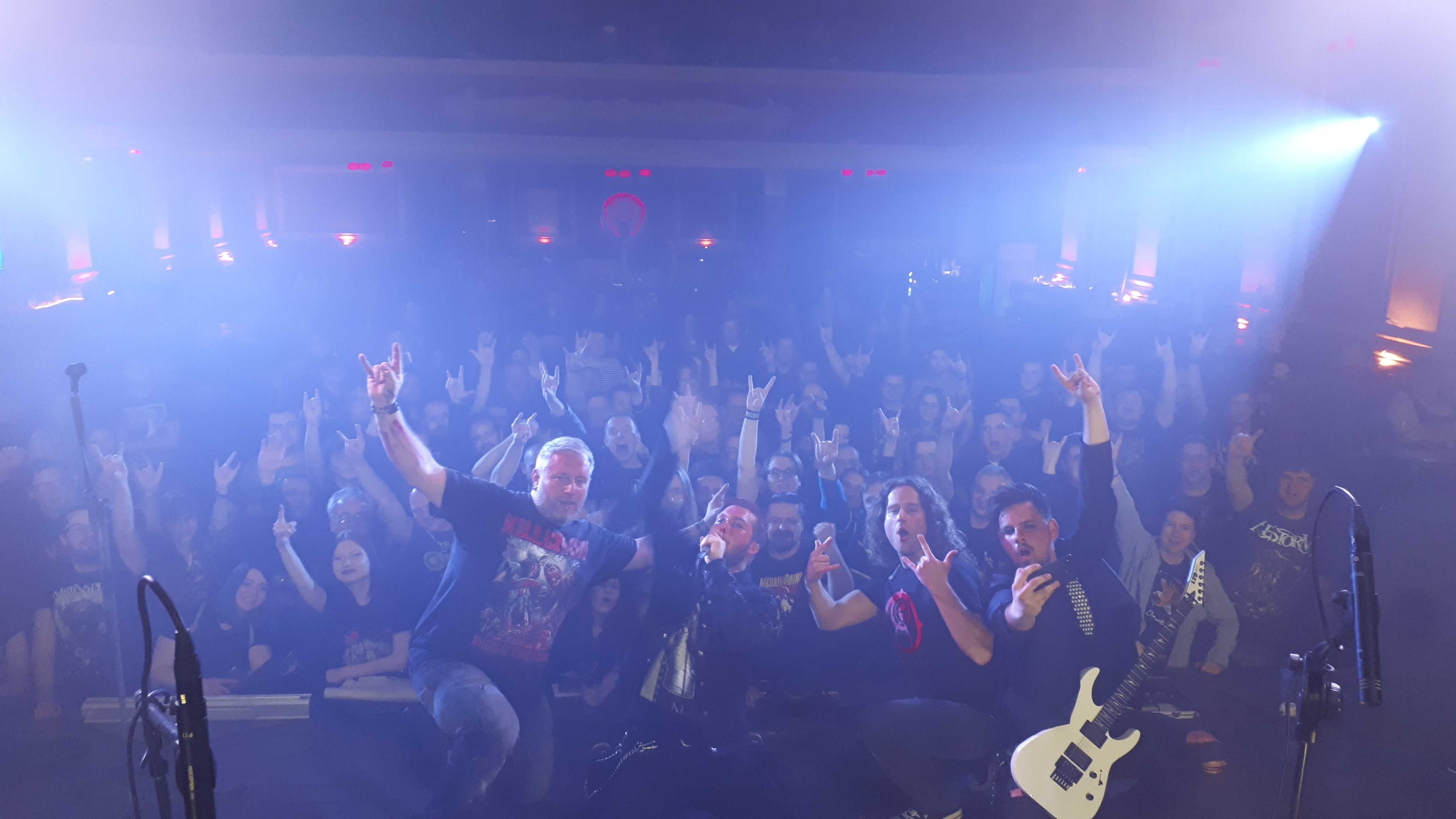 Opera - Sank Petersburg